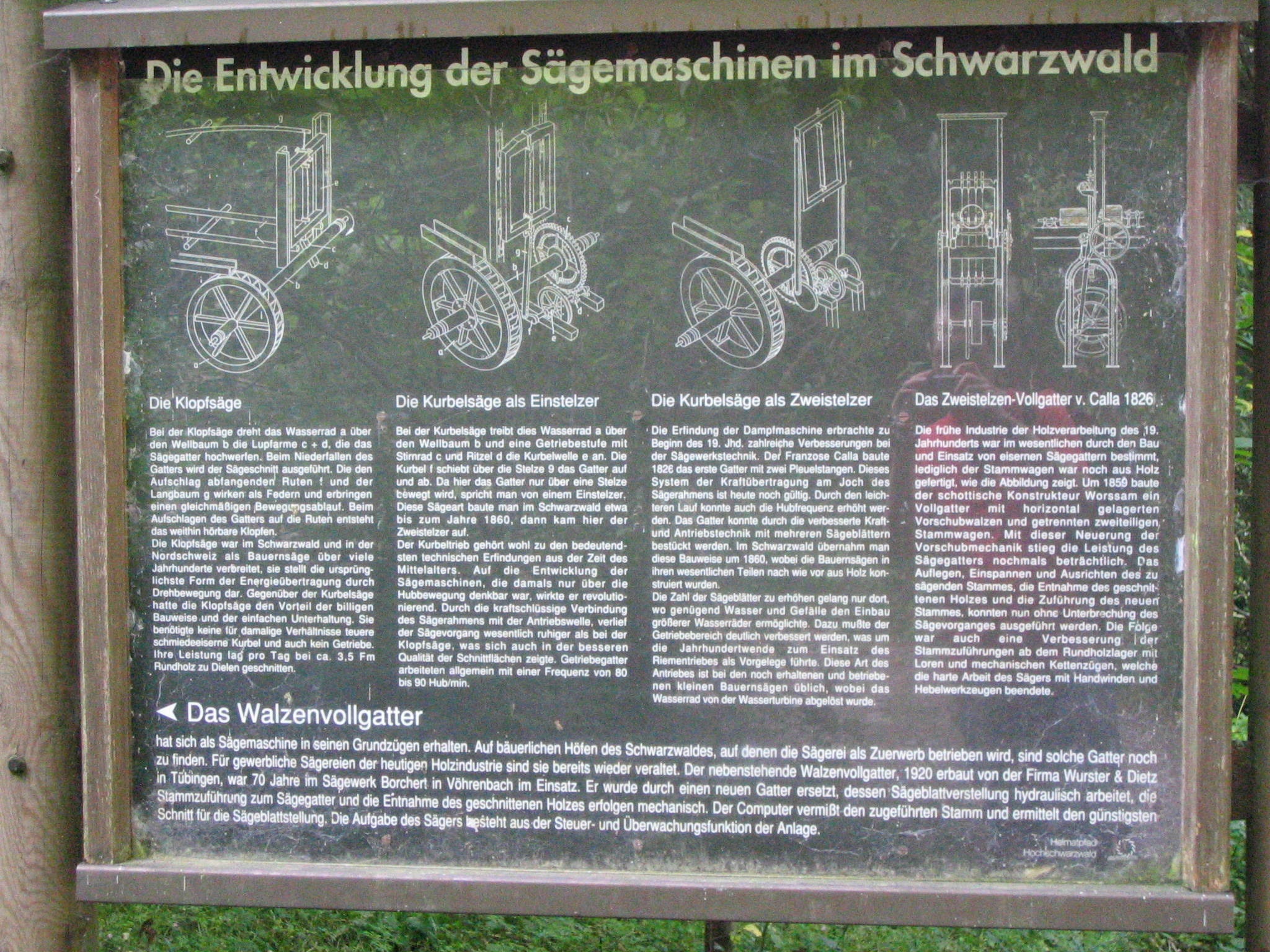 Permanent angebrachte Informationstafel beim Hofgut Sternen über die Entwicklung der Sägemaschinen im Schwarzwald